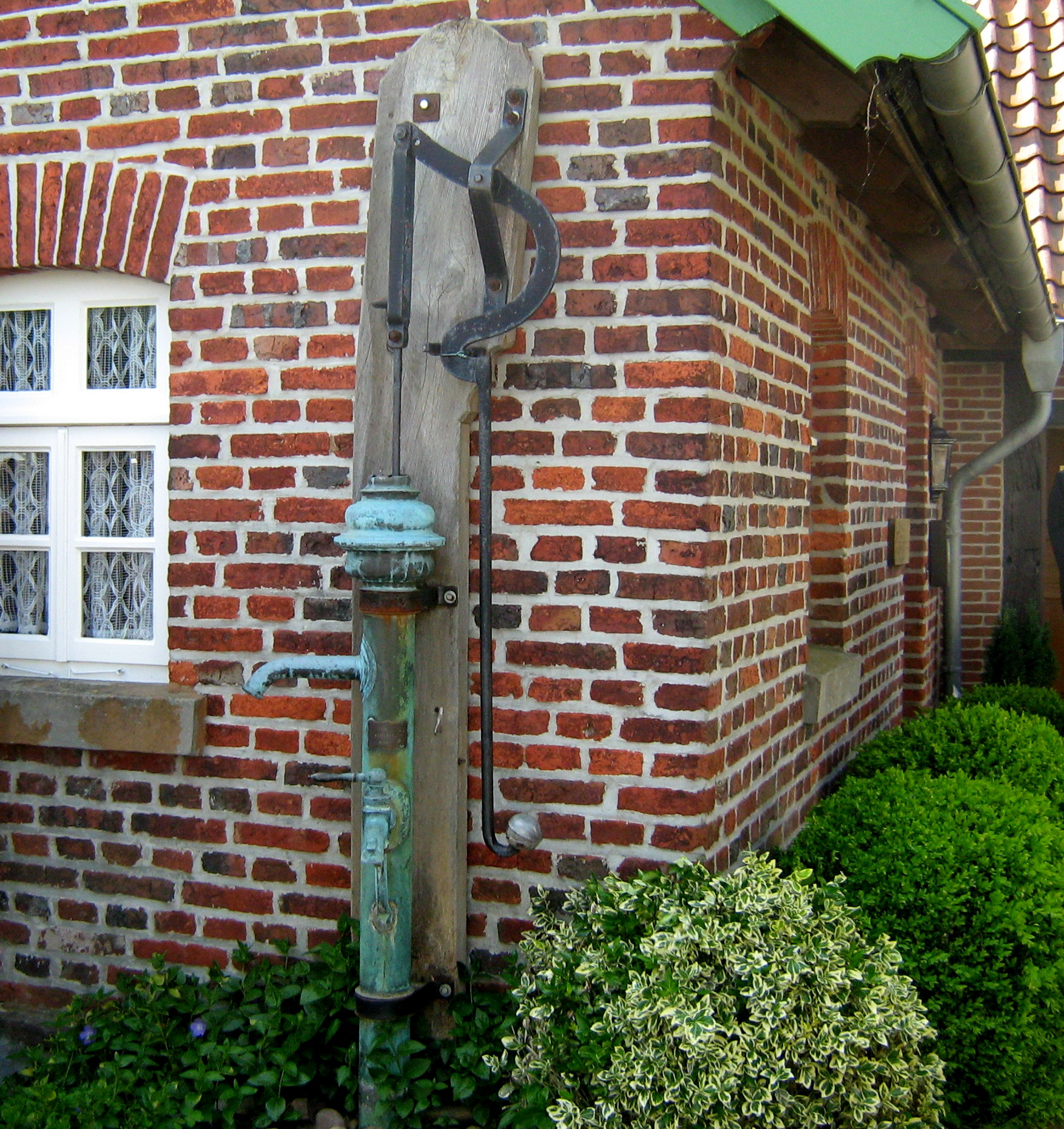 Schwengelpumpe an der Westhoyel Windmühle bei der Stadt Melle